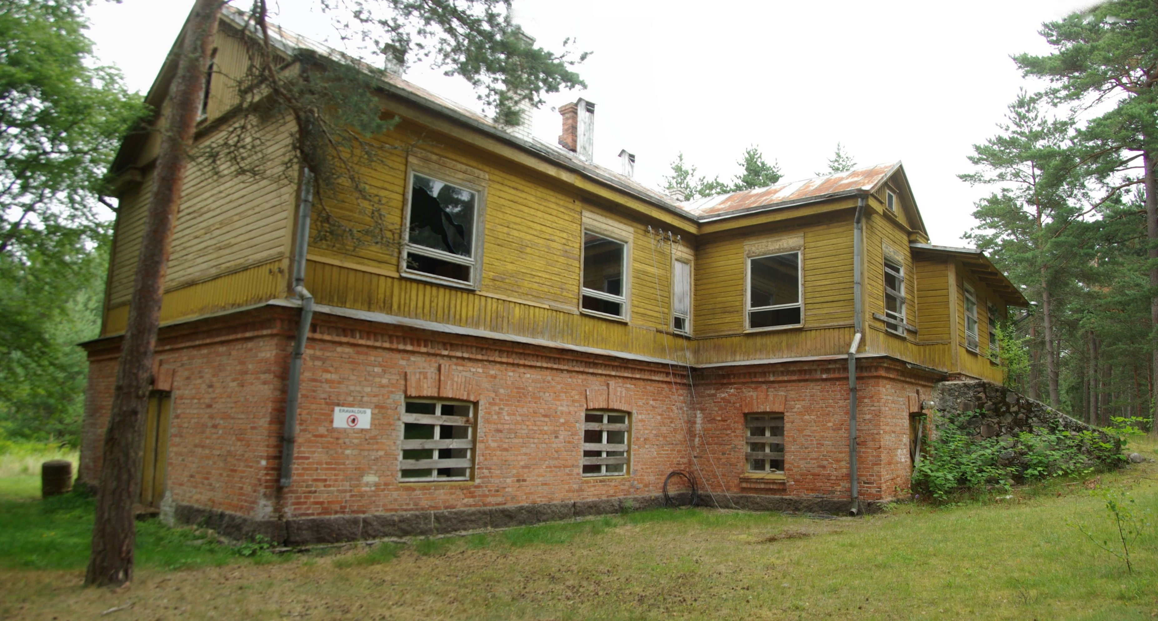 Harju maakond, Tallinna linn, Kesklinna linnaosa Aegna saar